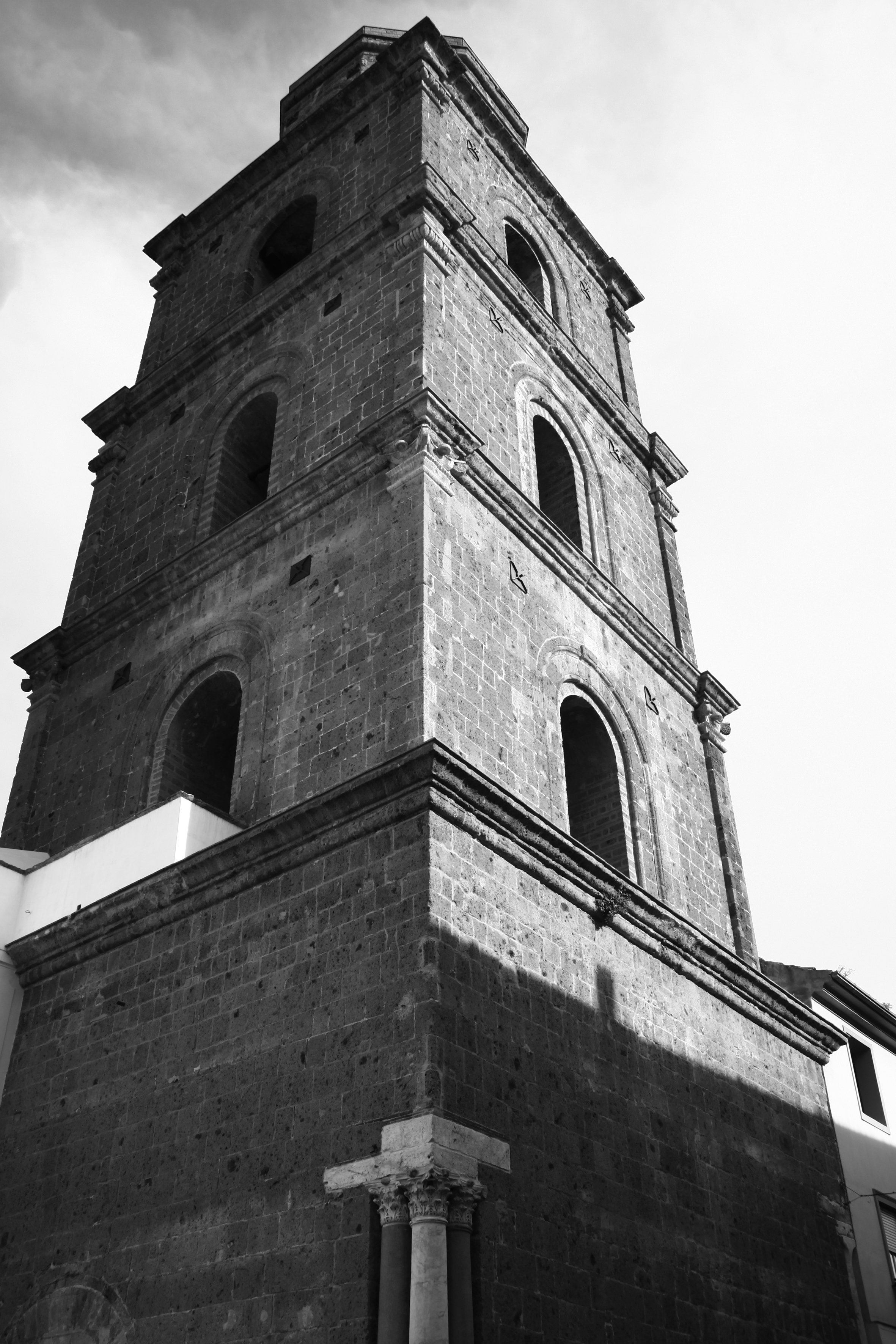 Campanile del Duomo di San Paolo di Aversa (CE)